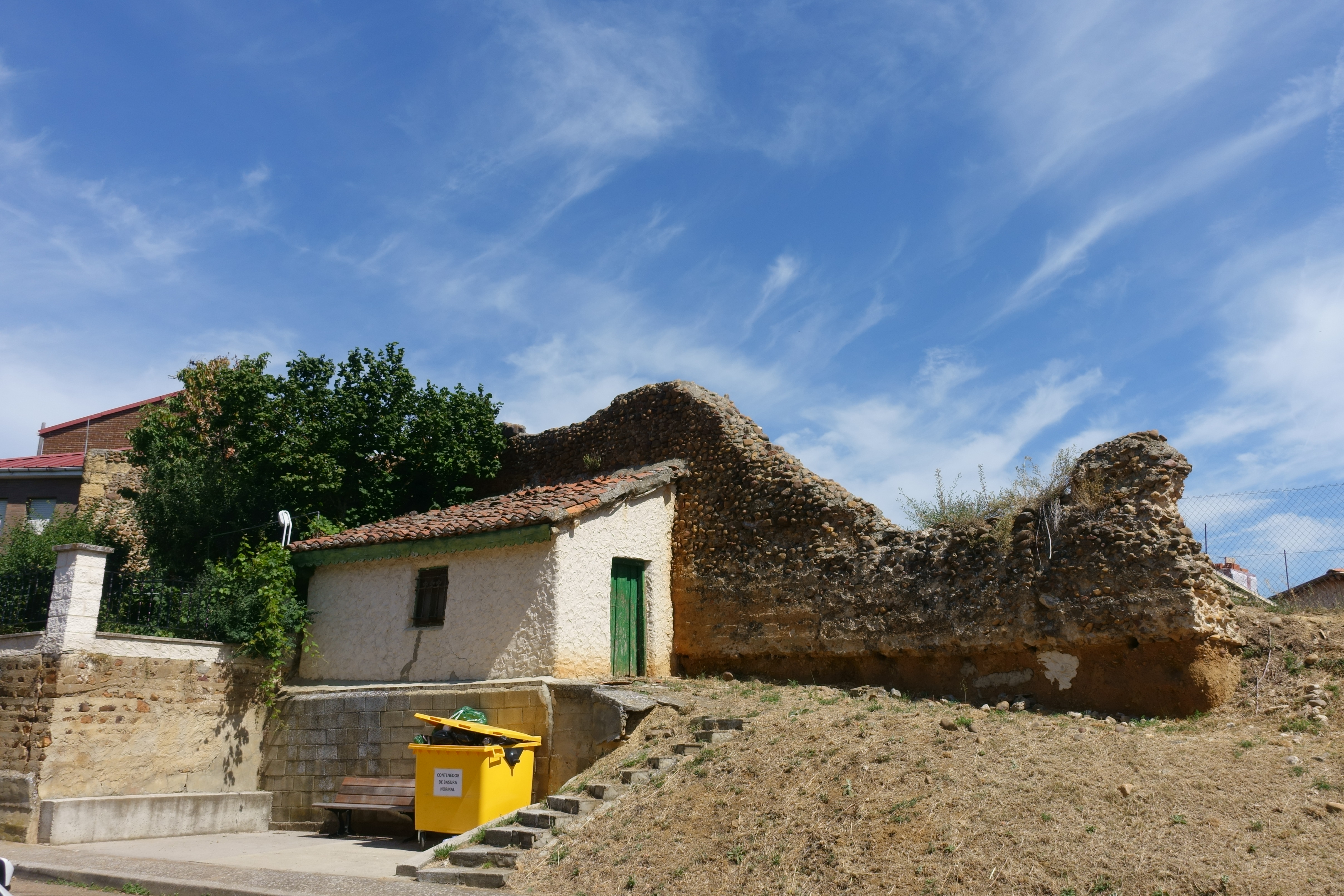 Restos de la muralla de Almanza (León, España).